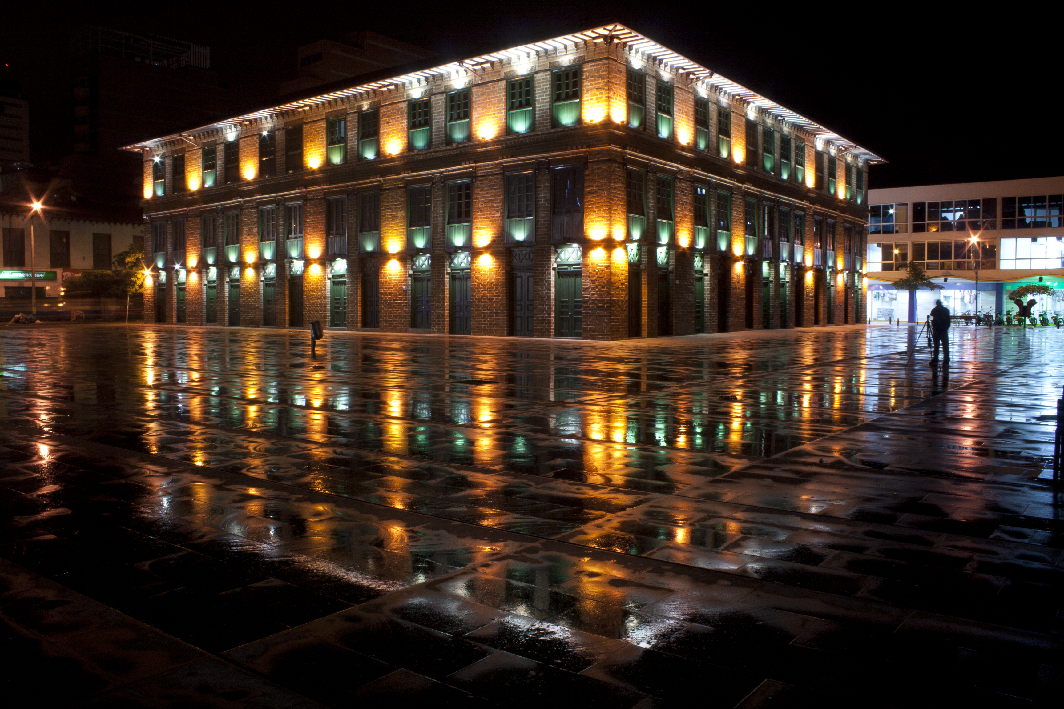 Noche de lluvia en el centro de la ciudad de Medellín, en el parque de las luces y el recientemente restaurado edificio Carré